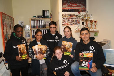 Engagement durch redaktionelle Mitarbeit – Die Redaktion vom Straßenfuball-Magazin buntkicker.